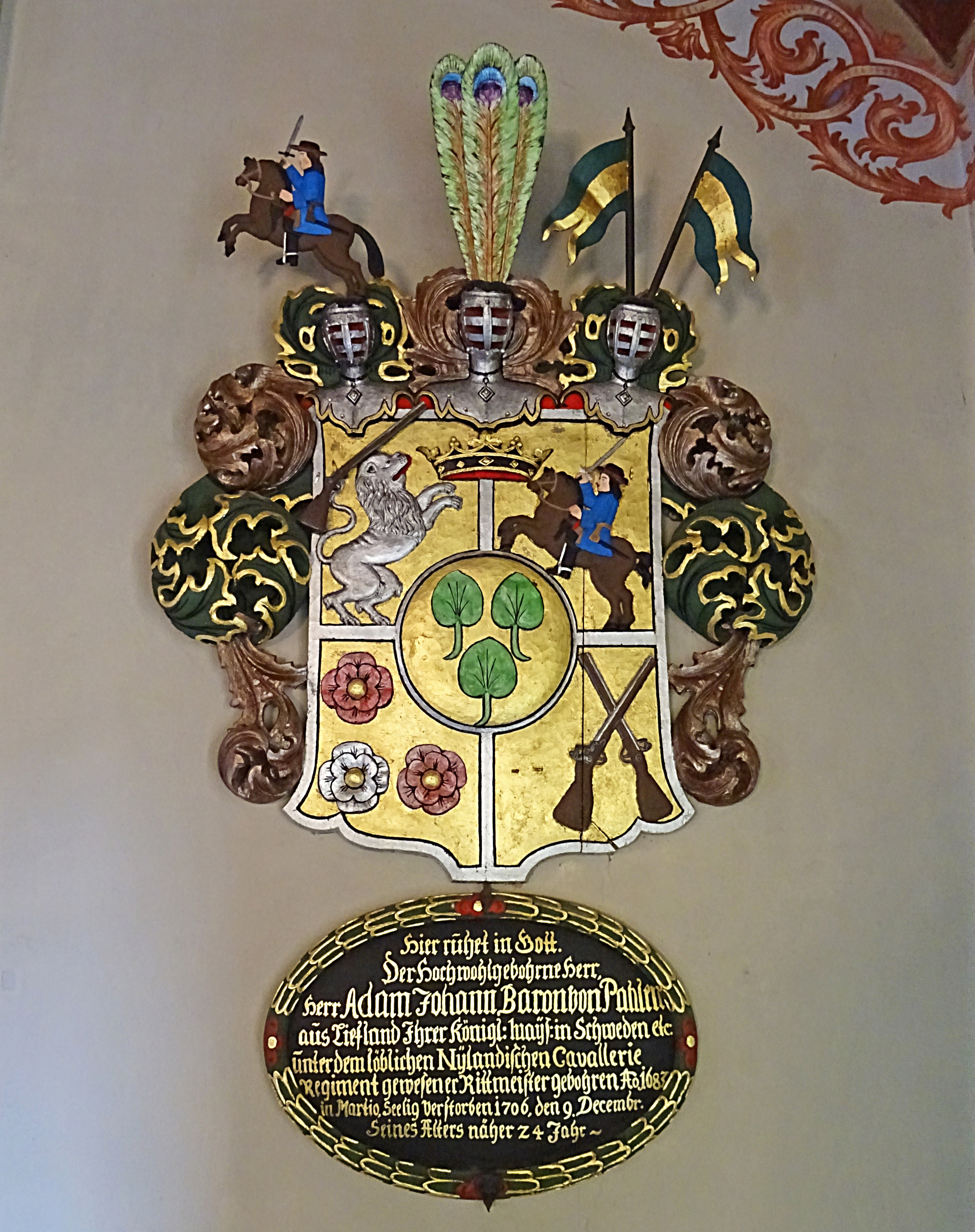 Epitaph für Adam Johann Baron von Pahlen (1706) in der Barockkirche St. Johannes in Dreitzsch.